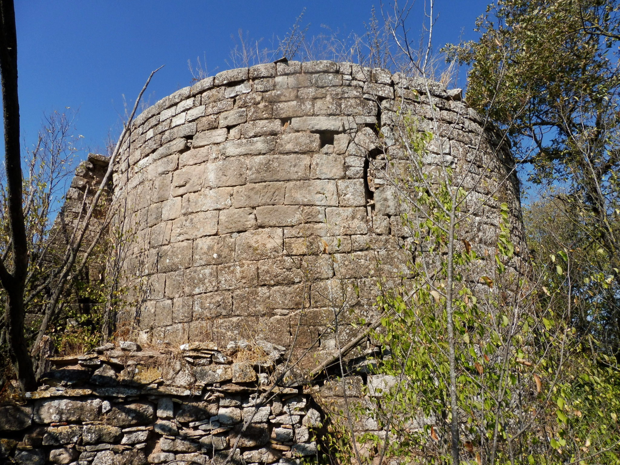 Ermita de Sant Ermengol (els Prats de Rei): absis